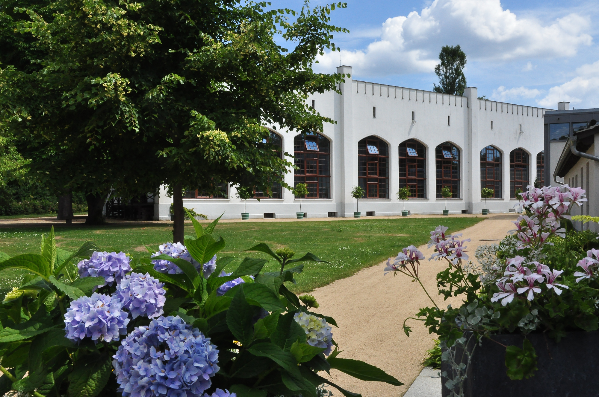 die Orangerie